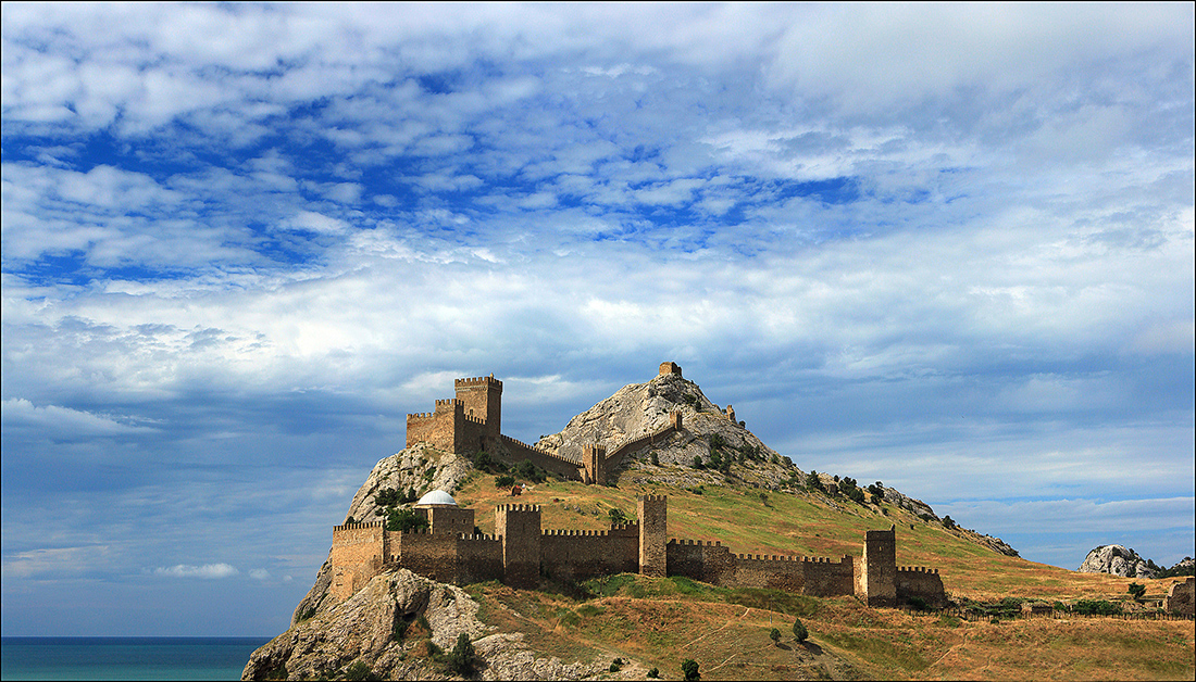 Архітектурно-археологічний комплекс «Судацька фортеця», Судак, північно-західні схили Фортечної гори